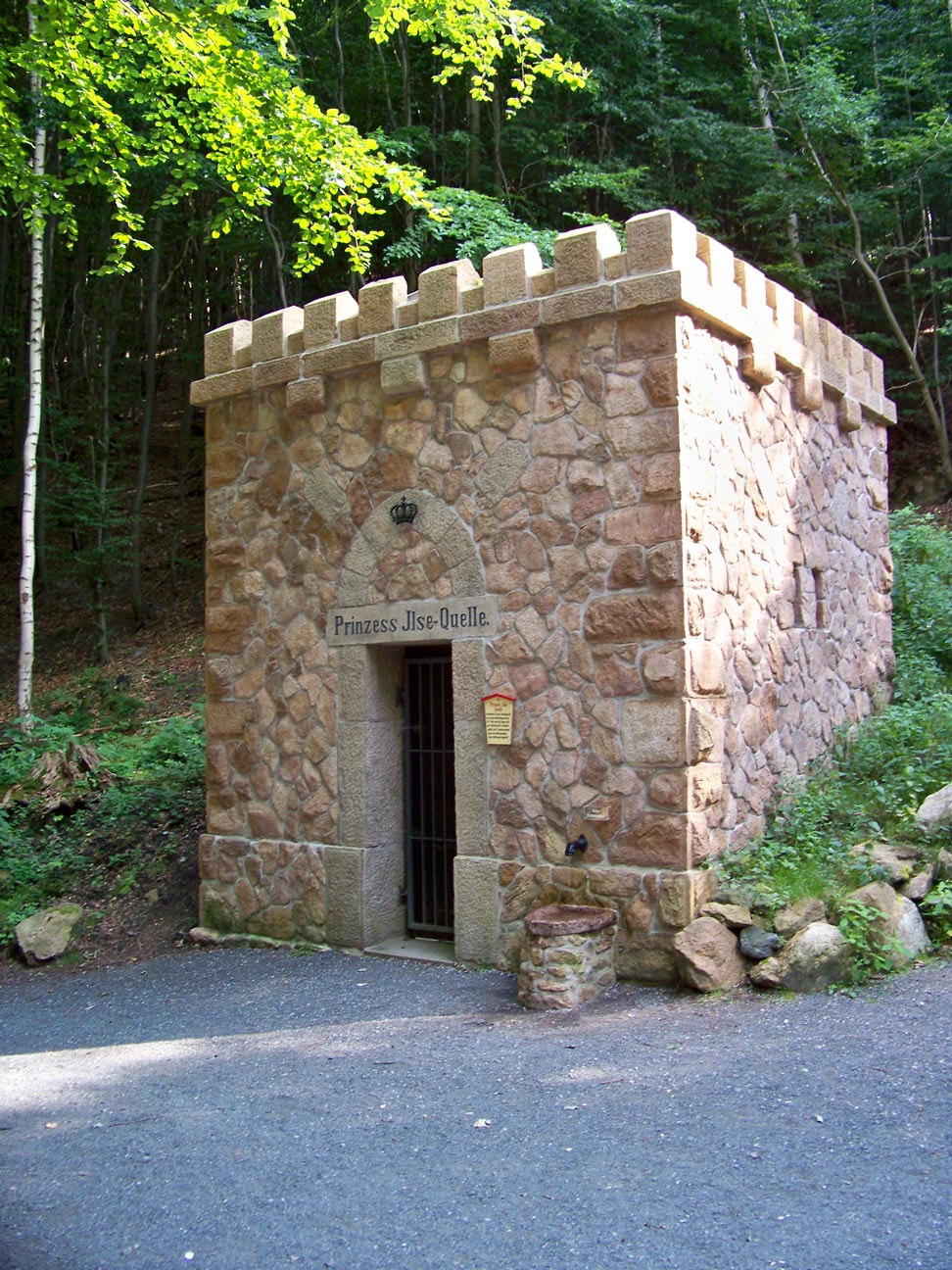 Prinzess Ilse - Quelle im Ilsetal bei Ilseburg im Harz